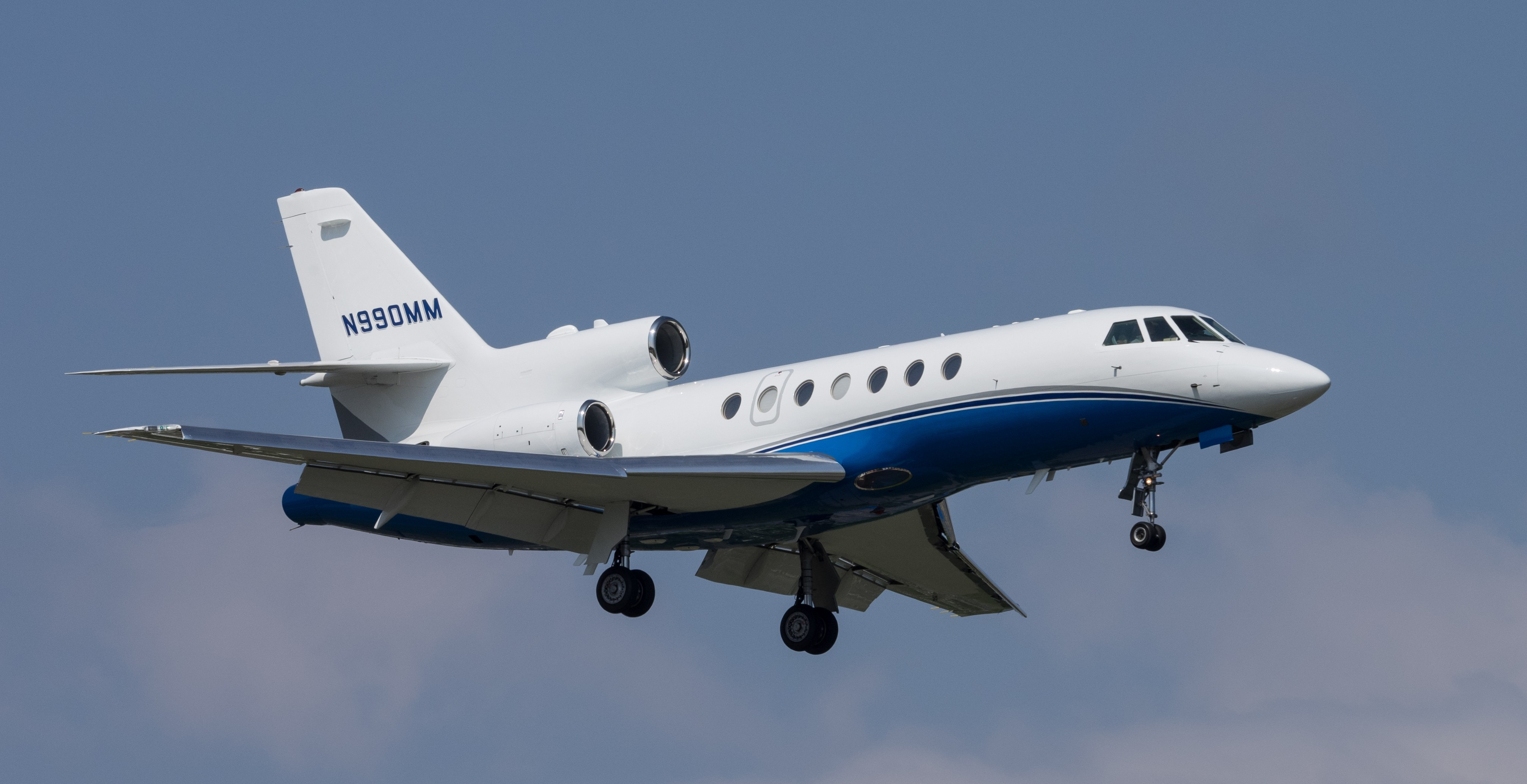 GVA 16.05.2015